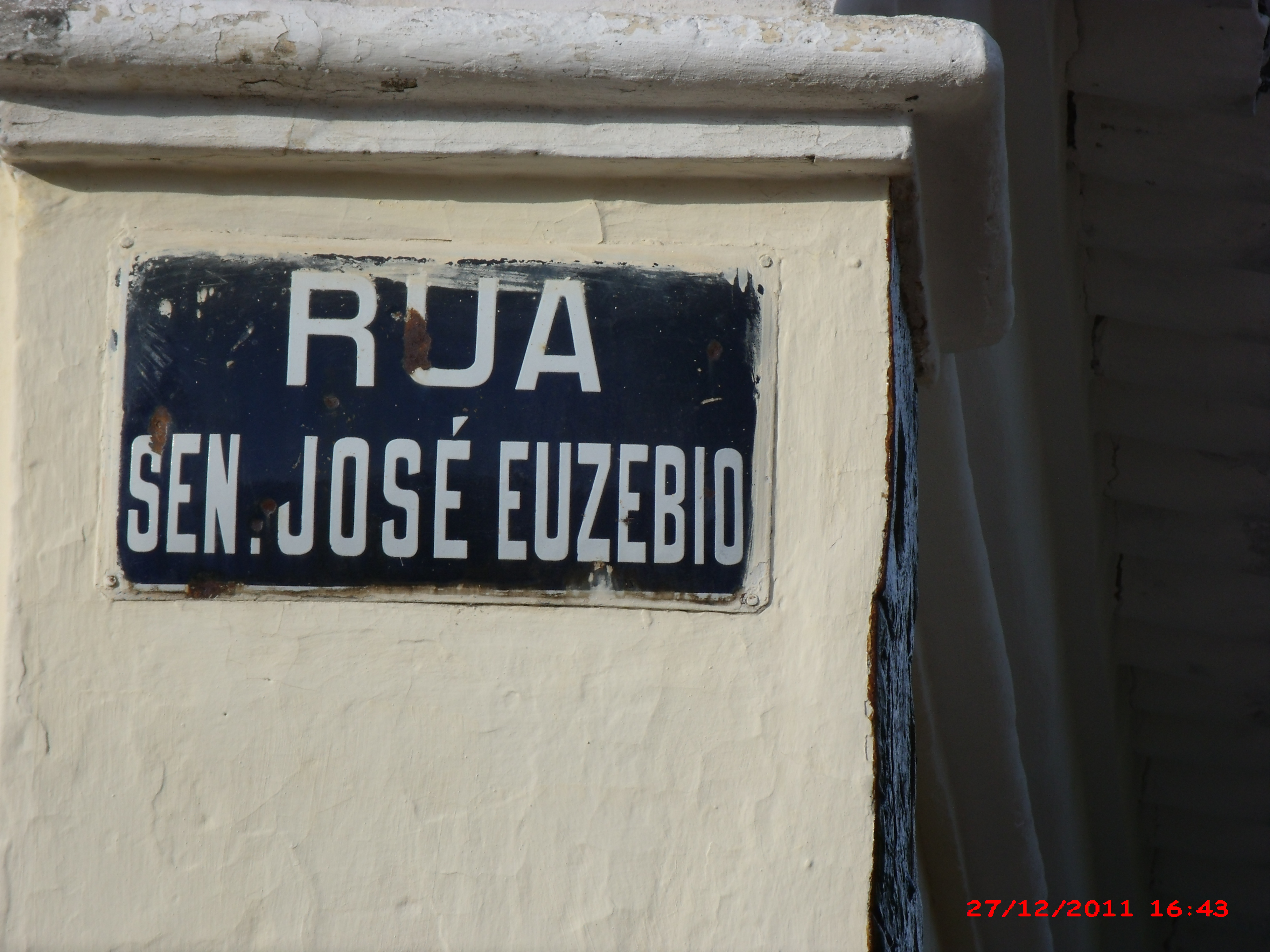 Placa de rua ao senador José Euzébio em Campo Maior, Piauí